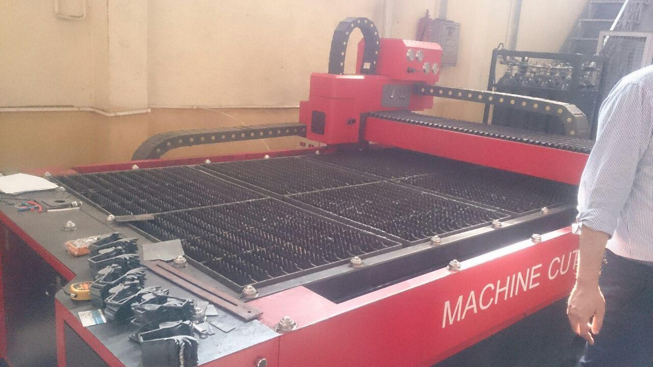 دستگاه برش لیزر